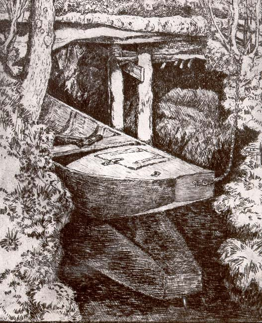 Moorgraben und Torfkahn